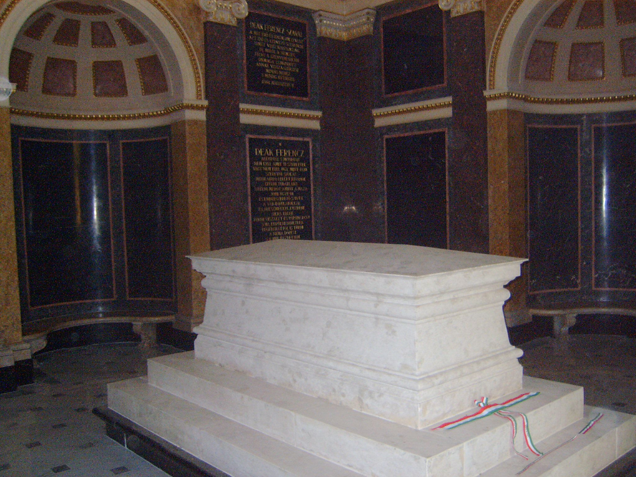 Sarkophag von Ferenc Deák in Budapest